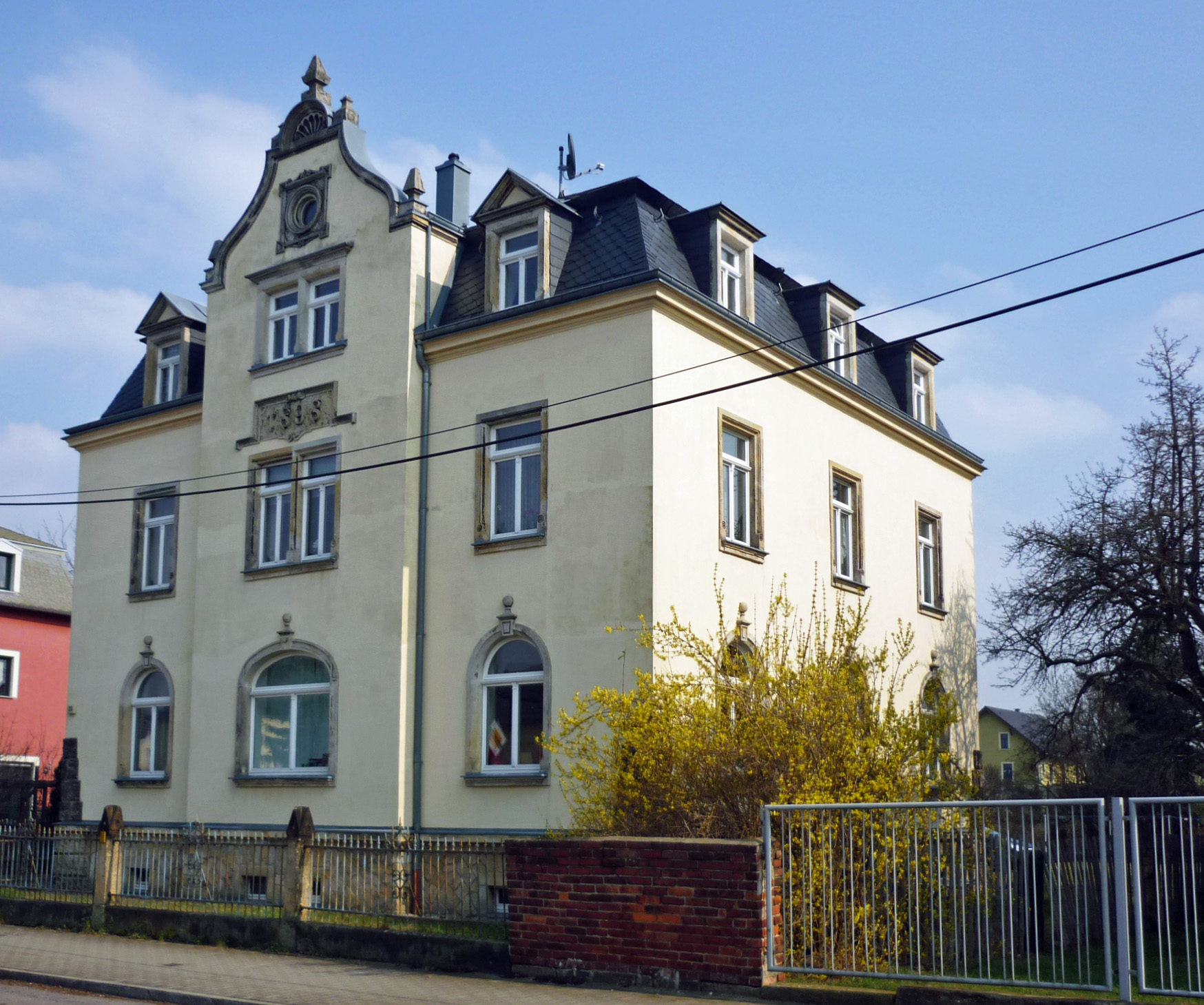 Haus Am Urnenfeld 23 in Dresden-Stetzsch